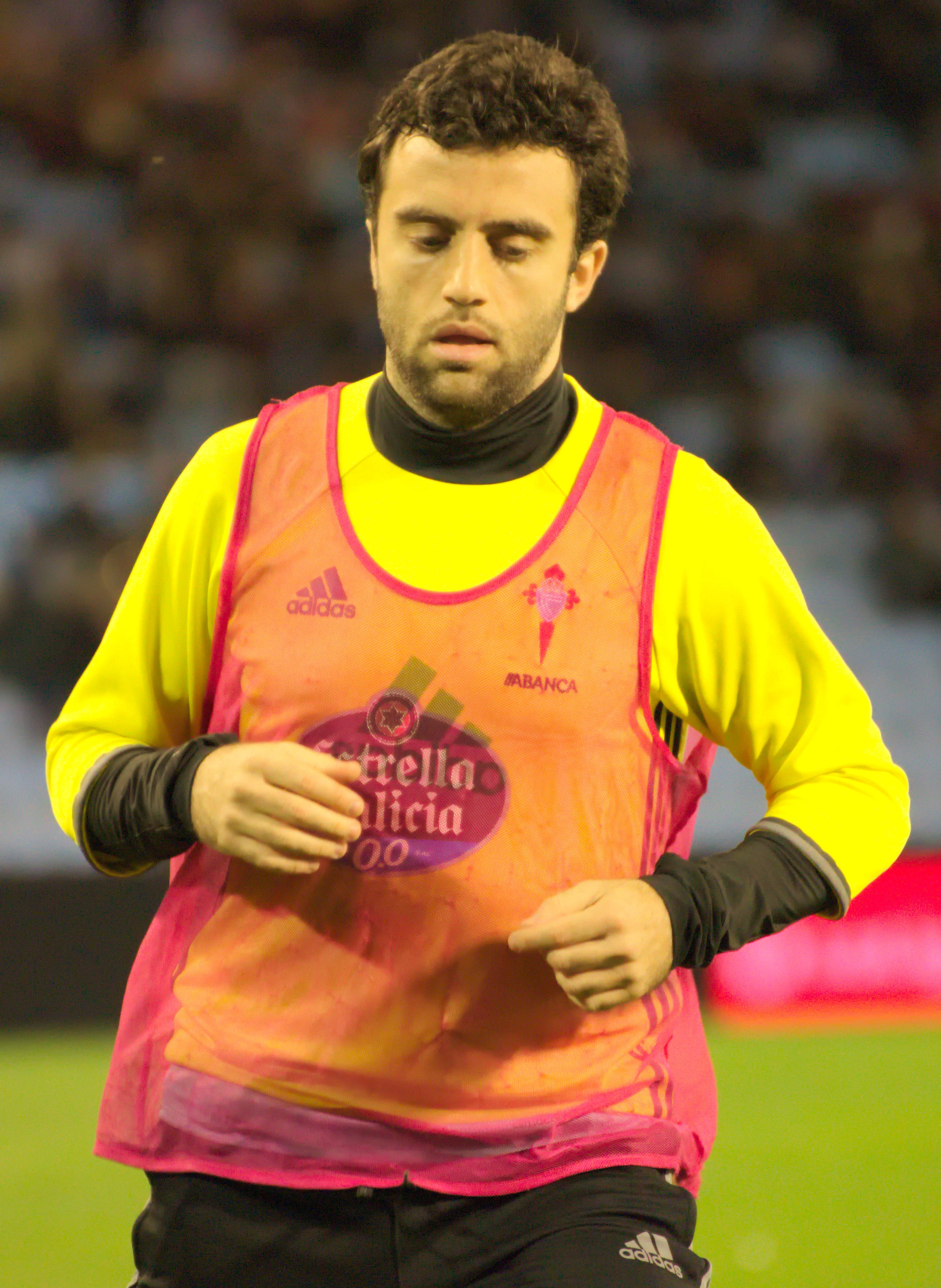 Giuseppe Rossi - RC Celta de Vigo